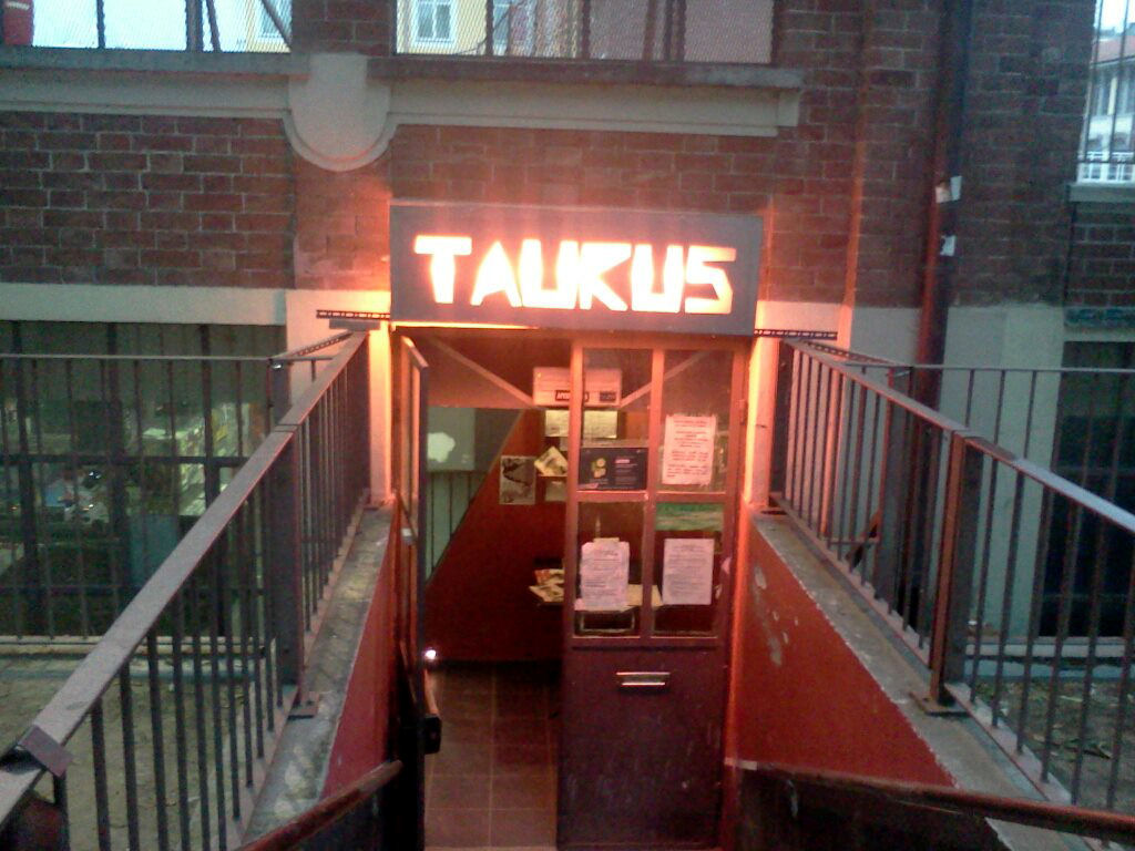 L'ingresso del Taurus, via Doria Ciriè